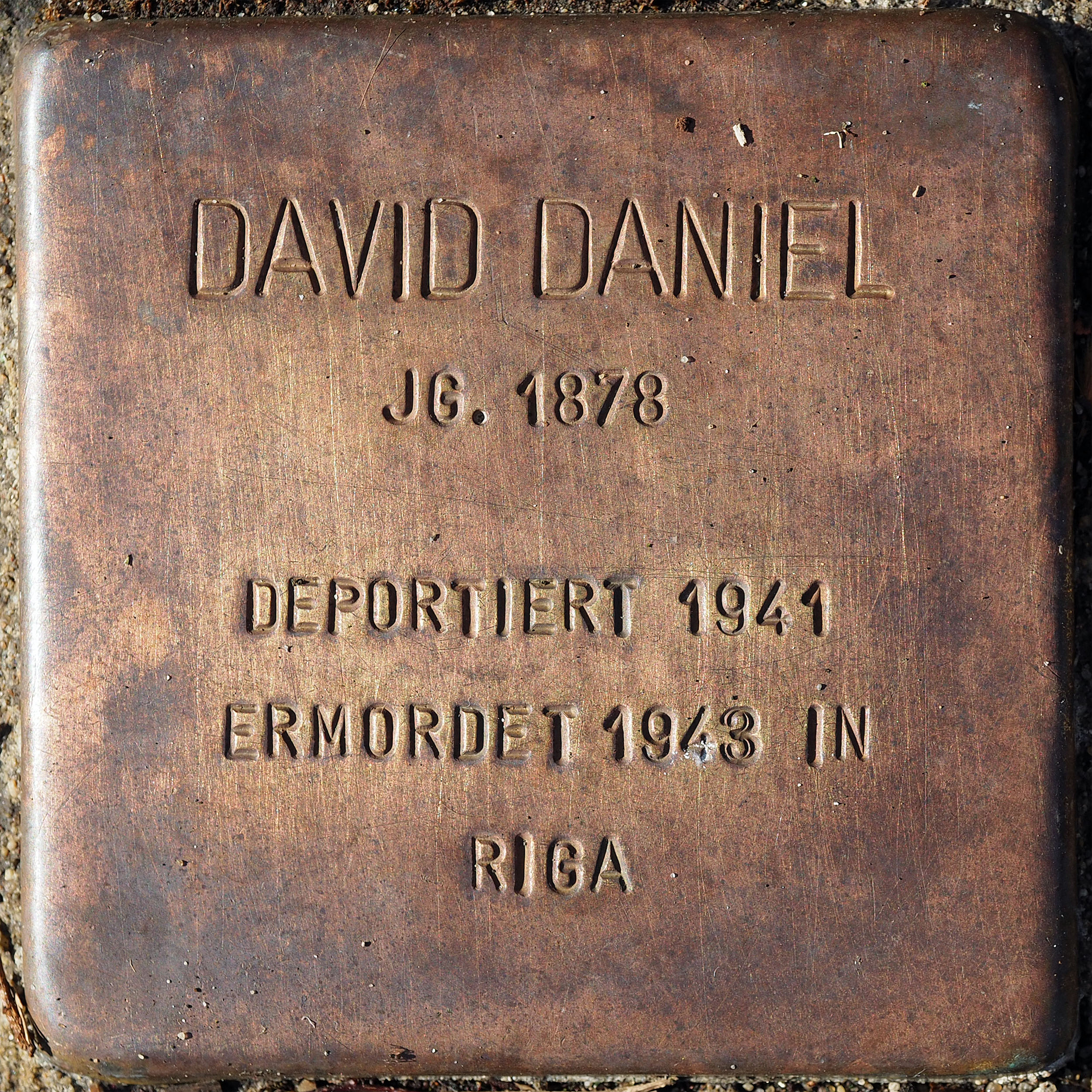 Stolperstein DU: Daniel, David